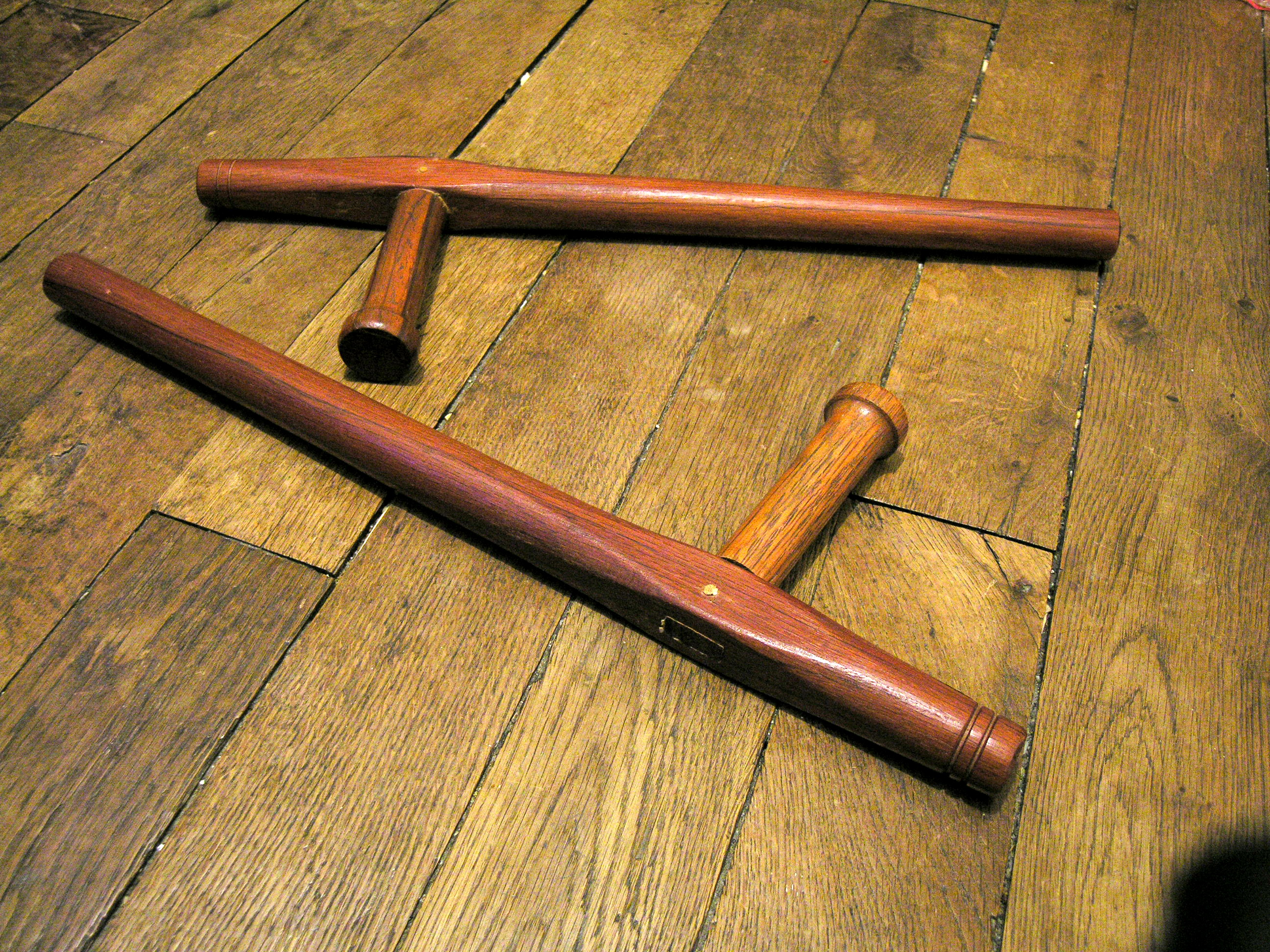 Photographie d'une paire de Tonfas de style d'Okinawa. Auteur : Ukulele ✉ 3 avril 2006 à 14:26 (CEST) 2006